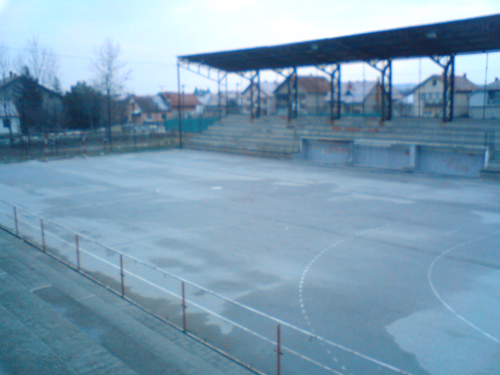 Teren za mali fudbal